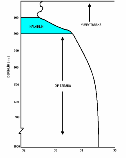 Tuzluluğun derinliğe bağlı değişimi